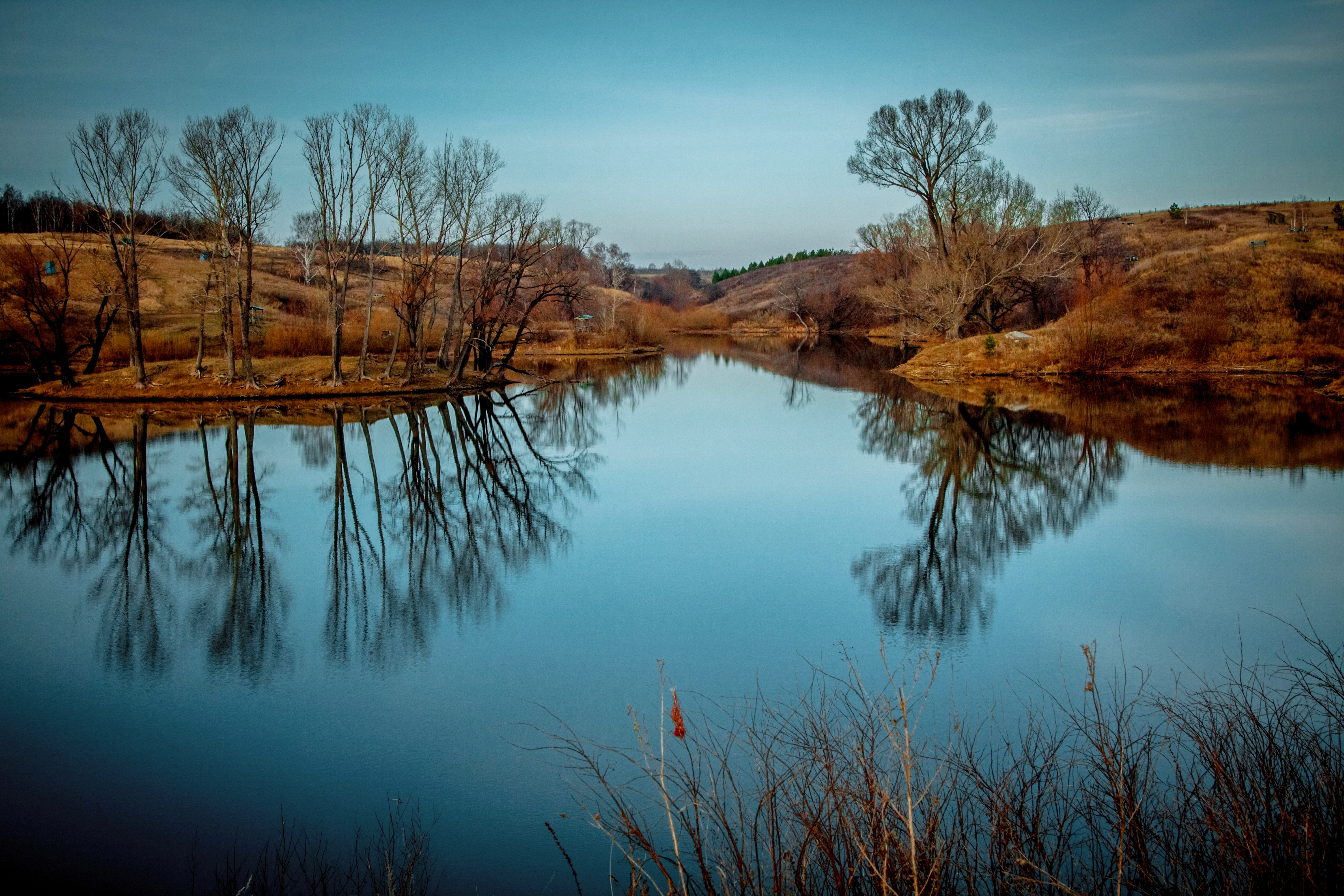 Озеро Тугар-Салган и его окрестности: Ишимбайский район, Башкортостан This image is related to the protected area of Russia number 0210155